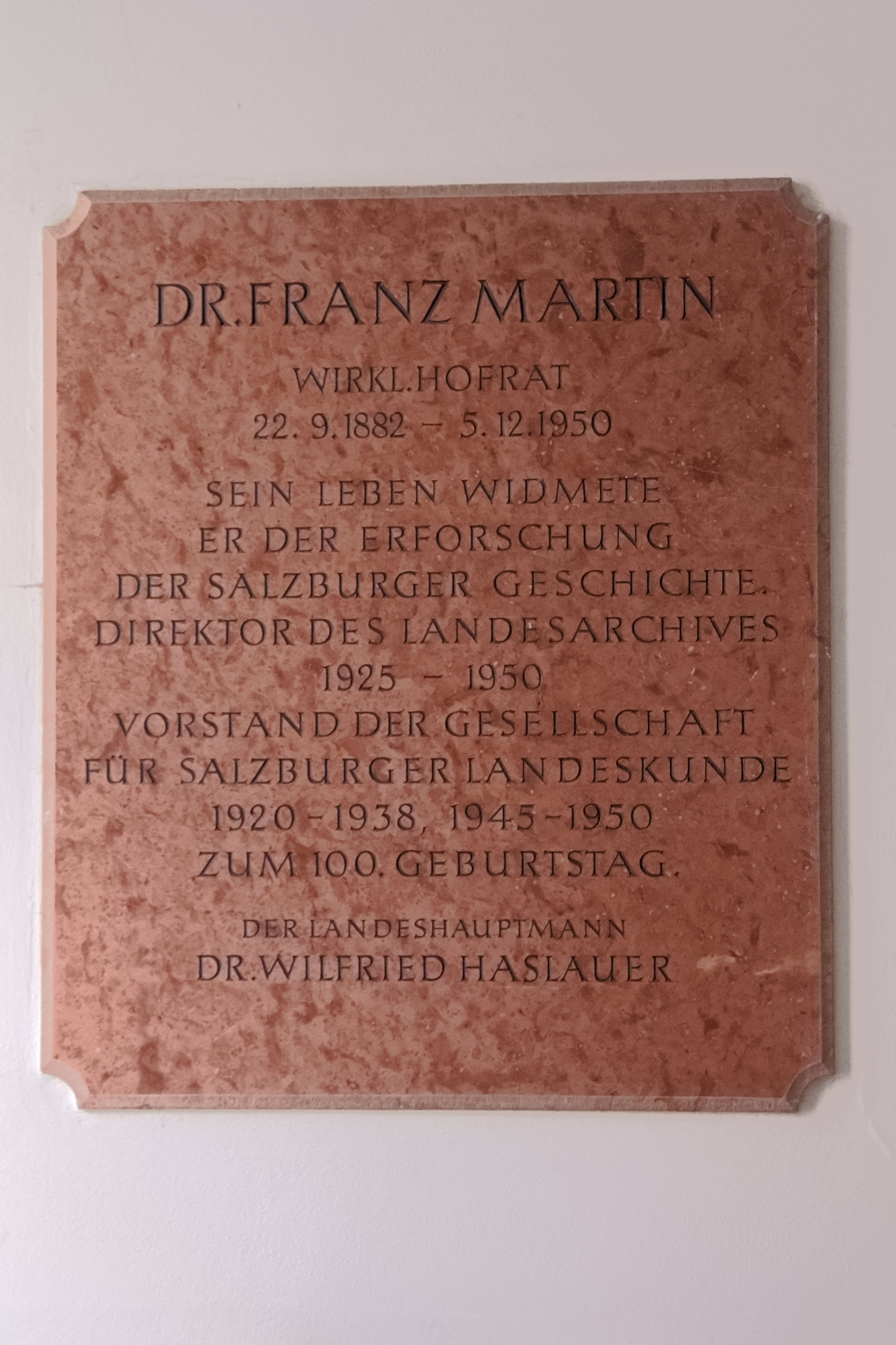 Innenhöfe und Eingangsbereiche der Neuen Residenz in Salzburg - Gedenktafel an den Salzburger Historiker und Archivar Franz Martin in einem Durchgang